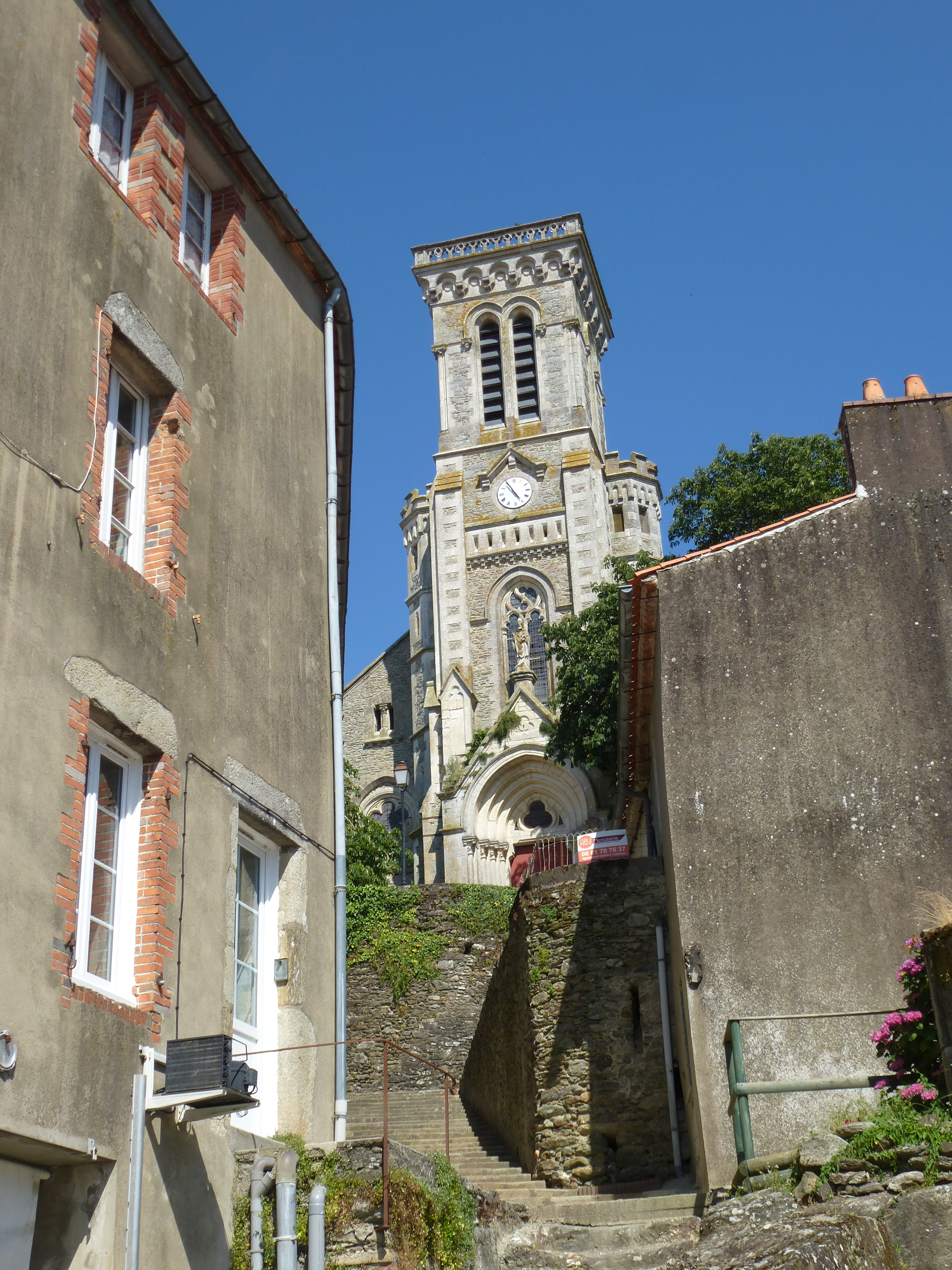 L'église vue d'une des montées d'Apremont